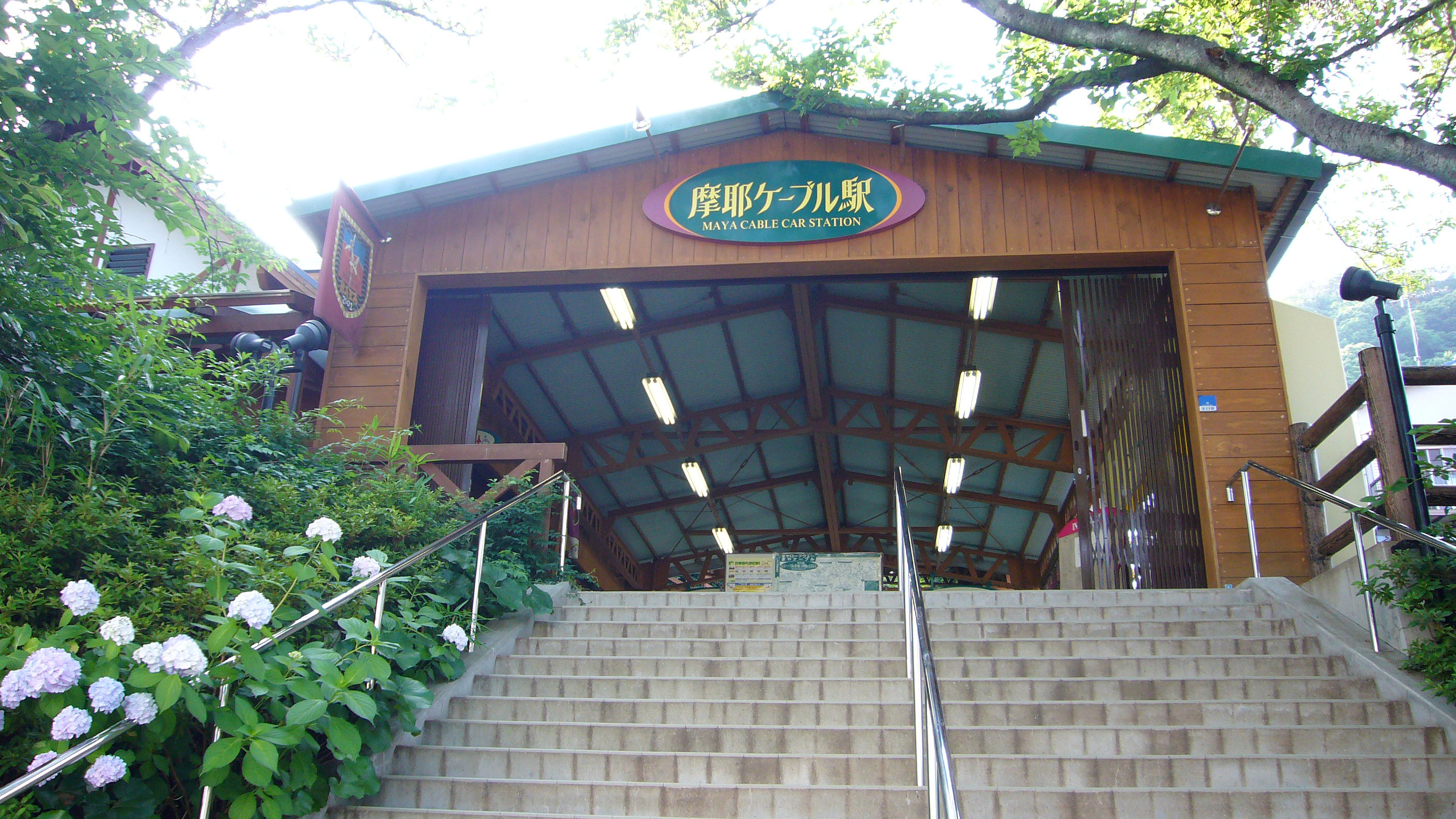 Maya Cablecar in Kobe, Japan